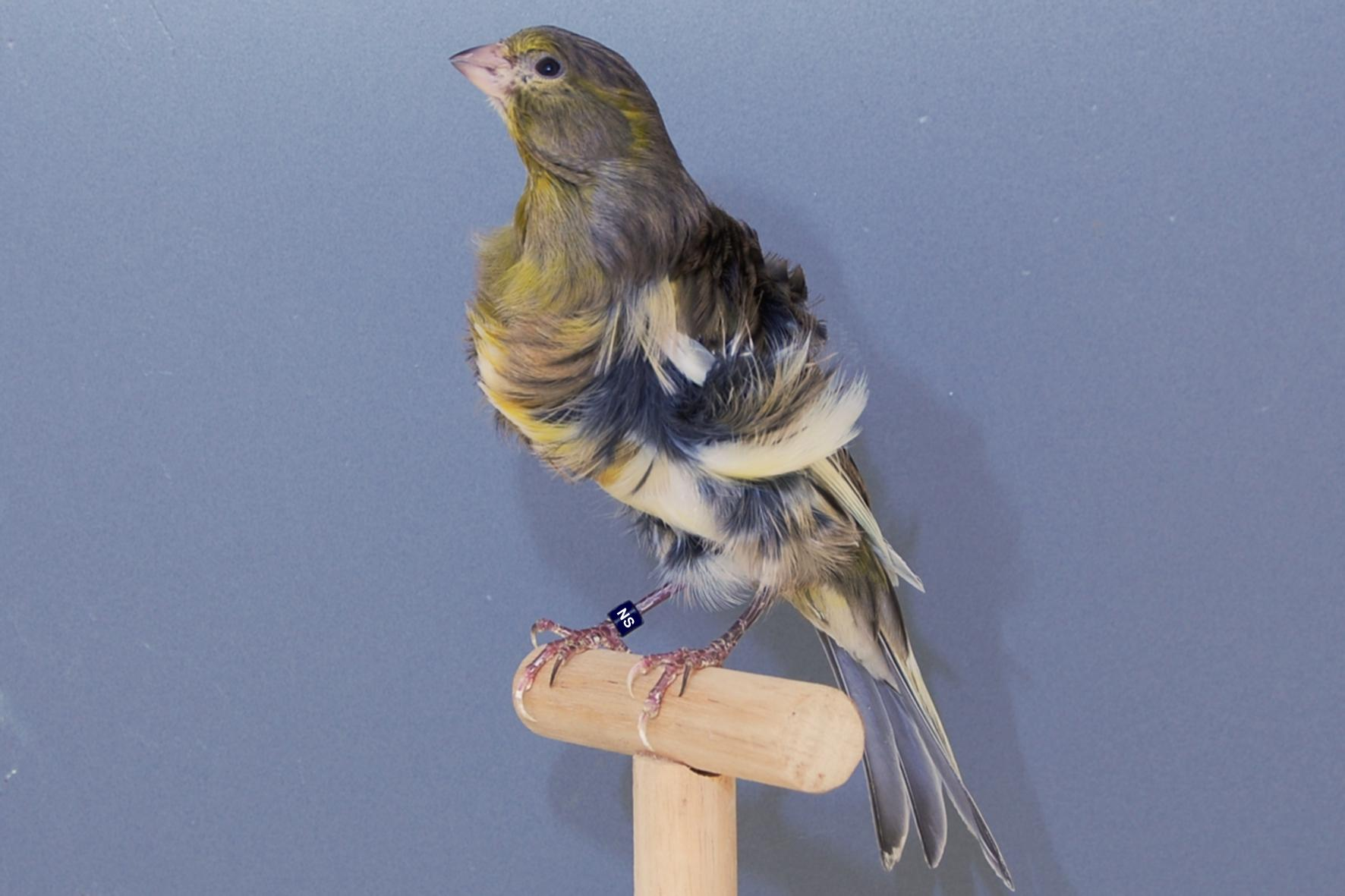 Positurkanarienrasse Fiorino Glattkopf gelbgrundig gescheckt